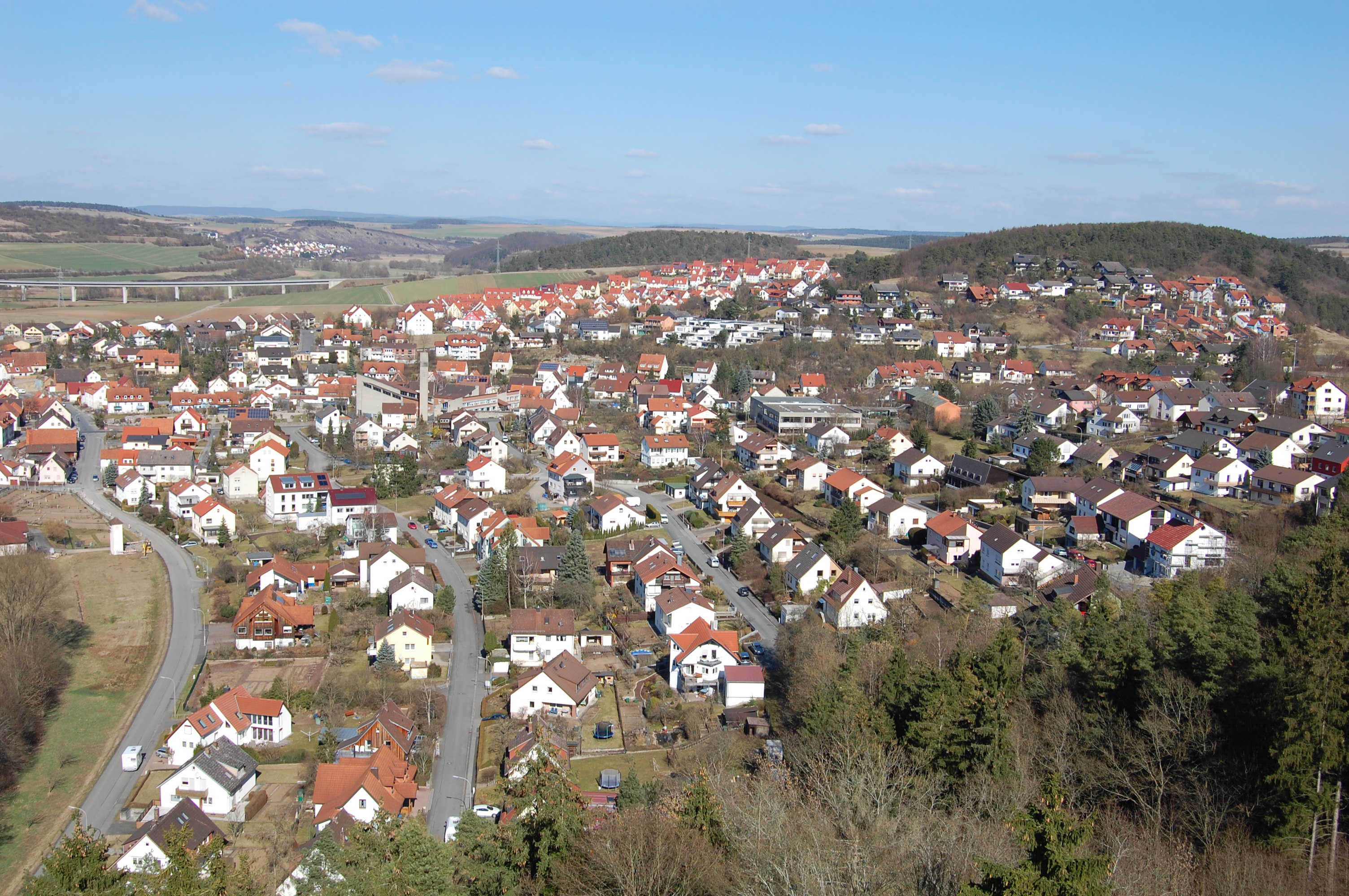 Herschfeld, Bad Neustadt an der Sale (2011)